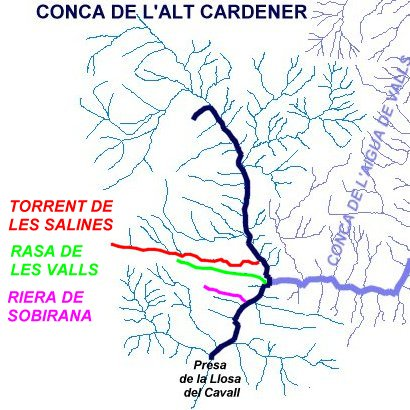 Mapa de la conca alta del Cardener (Vall de Lord, Solsonès) en el qual hi apareixen destacats el Torrent de les Salines, la Rasa de les Valls i la Riera de Sobirana.